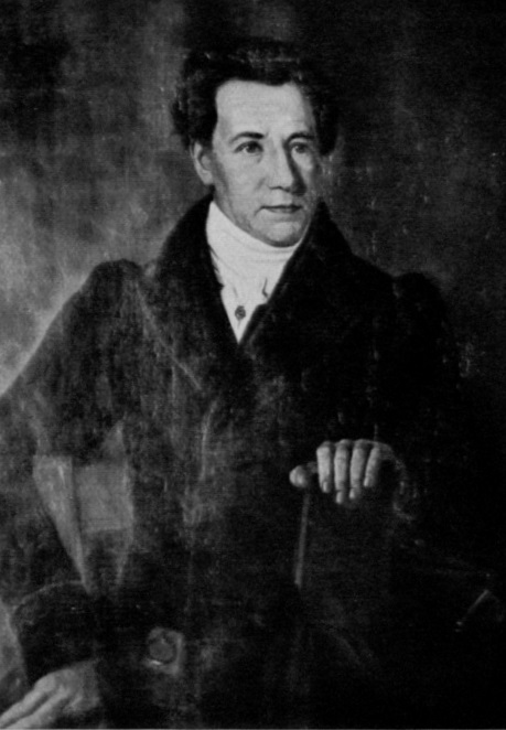 Johann Hinrich Wohlien auf einem Gemälde von C.W. Wohlien, 1835